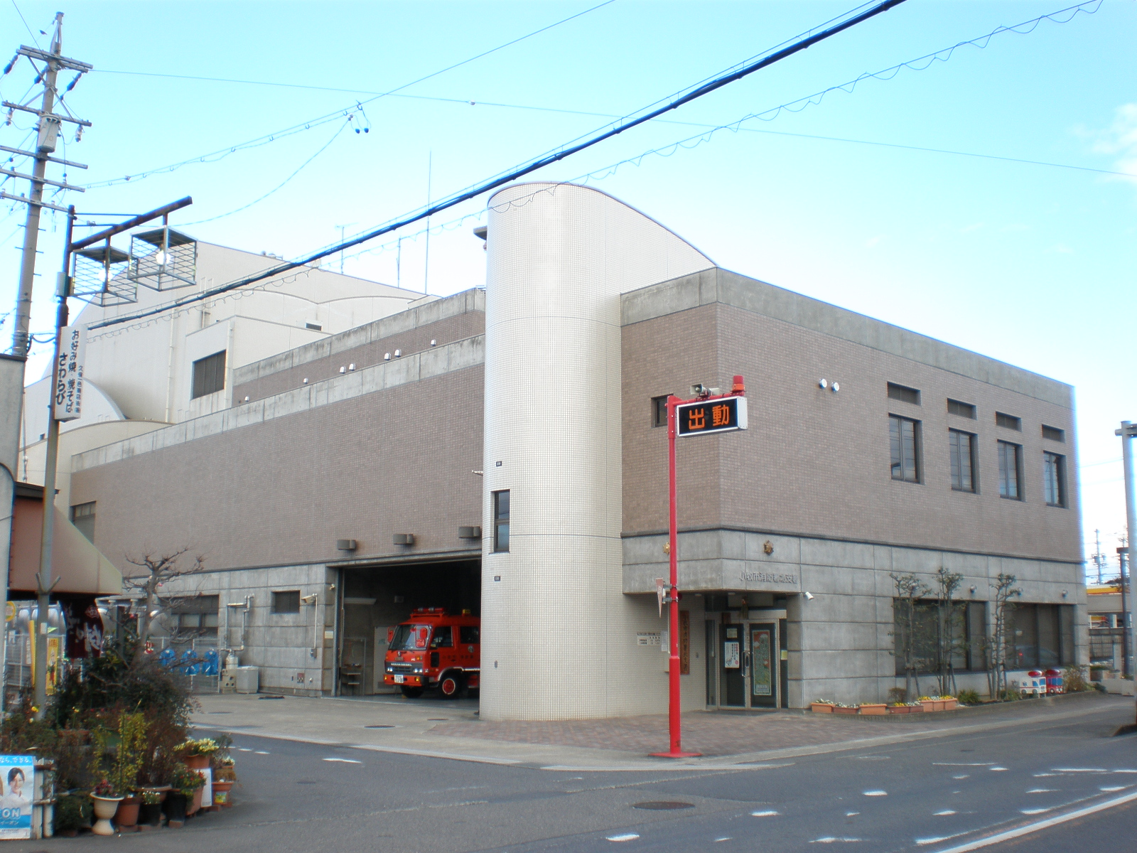 愛知県小牧市消防本部北支署